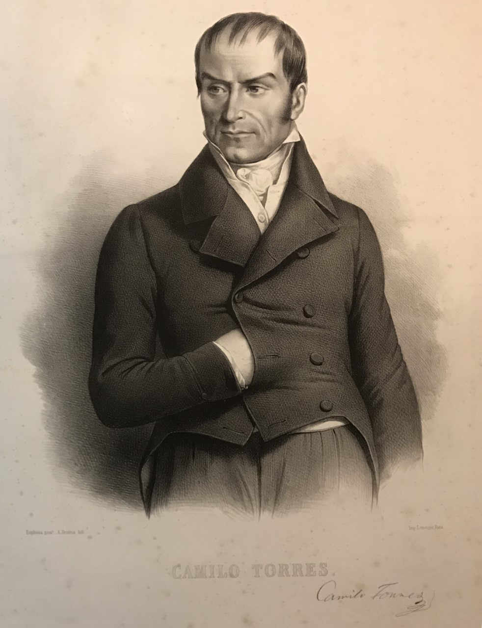 Grabado del prócer Camilo Torres basado en obra de Espinosa